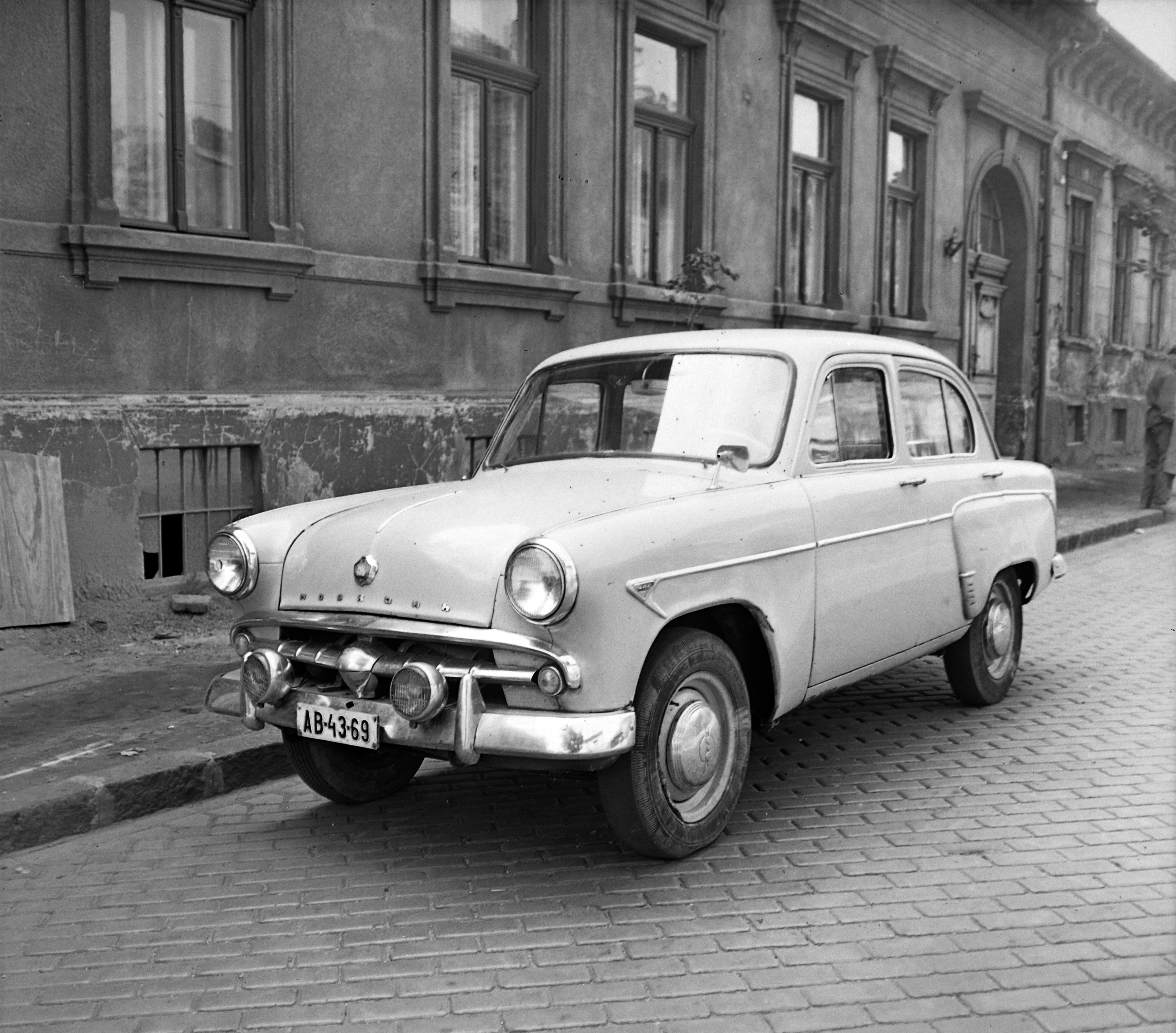 A kép forrását kérjük így adja meg: Fortepan / Budapest Főváros Levéltára. Levéltári jelzet: HU.BFL.XV.19.c.10 Location: Hungary Tags: Moscow-brand Title: A kép forrását kérjük így adja meg: Fortepan / Budapest Főváros Levéltára. Levéltári jelzet: HU.BFL.XV.19.c.10